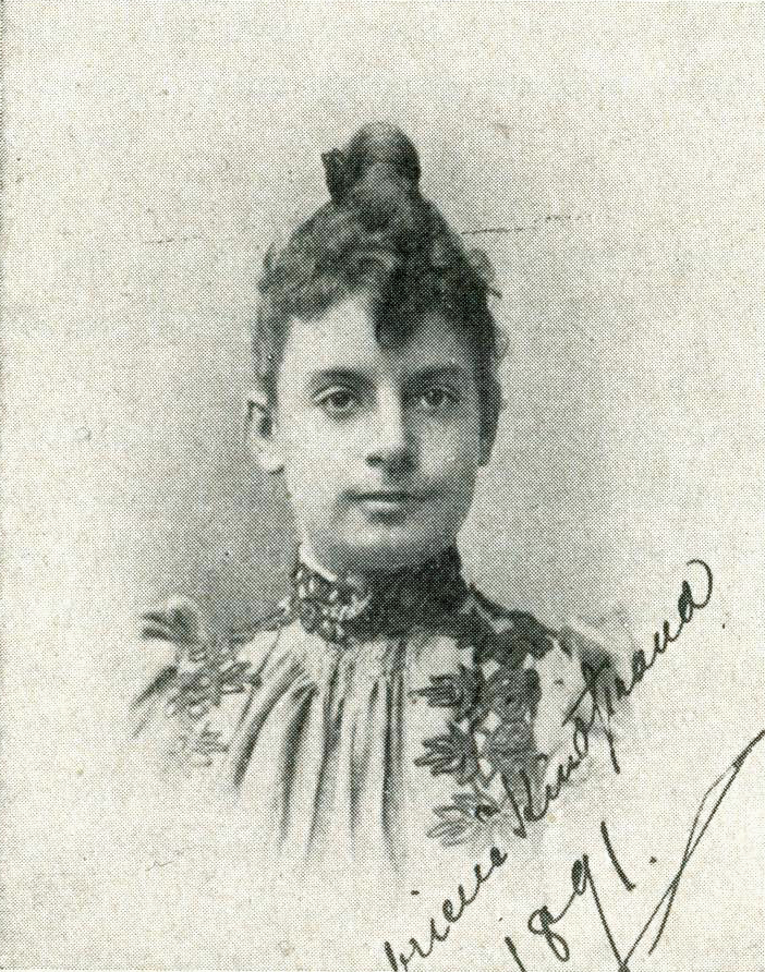 Gabrielle Kindstrand.